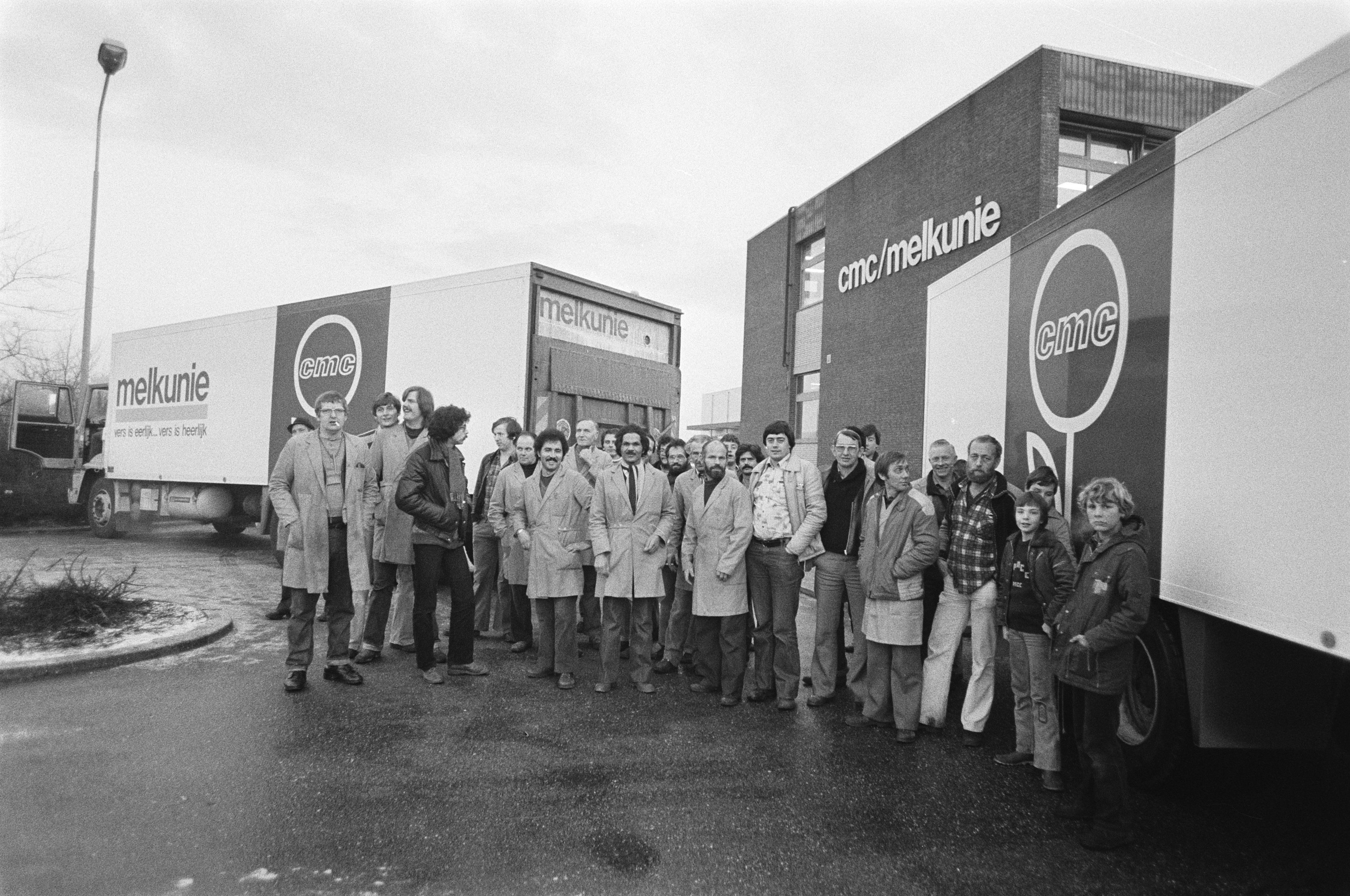 Collectie / Archief : Fotocollectie Anefo Reportage / Serie : [ onbekend ] Beschrijving : Chauffeurs CNC Melkunie staken voor loonsverhoging (Amsterdam) Datum : 2 januari 1980 Locatie : Amsterdam, Noord-Holland Trefwoorden : chauffeurs, industrie, stakingen Persoonsnaam : CNC Melkunie Fotograaf : Croes, Rob C. / Anefo Auteursrechthebbende : Nationaal Archief Materiaalsoort : Negatief (zwart/wit) Nummer archiefinventaris : bekijk toegang 2.24.01.05 Bestanddeelnummer : 930-6042